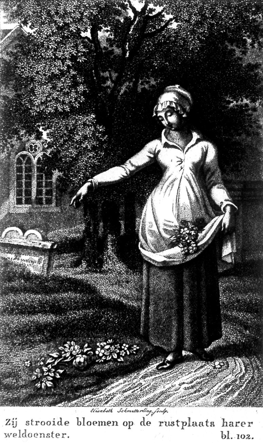 Gravure voor "De meisjesjaren van Sofia Walter, de dochter van eenen landman te Gronouw : een zedelijk verhaal voor meisjes" gemaakt door Elisabeth Barbara Schmetterling (1801-1882)